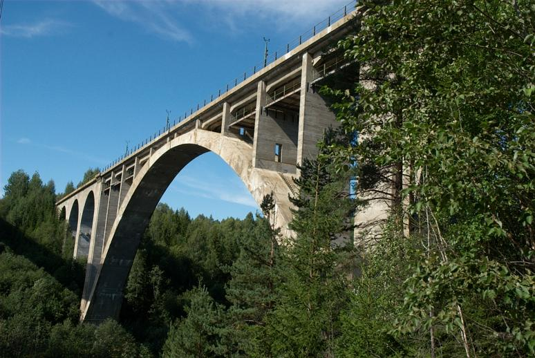 Andra bron. Järnvägsbron, som stod klar 1919, är byggd i fyra valv och ett bågspann. Den hade då med sina 90 meters spännvidd, världens längsta betongspann för järnvägstrafik.; Bro; Byggnadsverk; Kommunikationsväsen